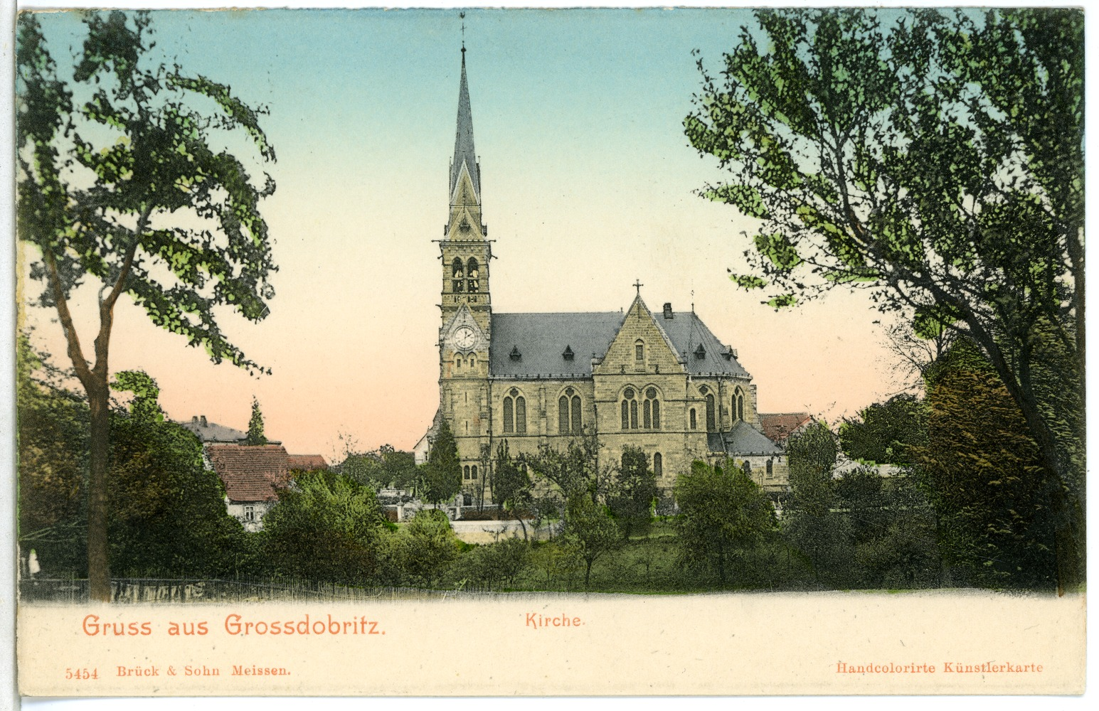 Großdobritz; Kirche Diese Ansichtskarte stammt vom Kunstverlag Brück & Sohn aus Meißen ( Die Karte hat die eindeutige Nummer 05454 und ist in höherer Auflösung beim Verlag erhältlich. Sie wurde im Rahmen einer Kooperation zwischen Wikipedianern und dem Kunstverlag für Wikimedia Commons zur Verfügung gestellt.